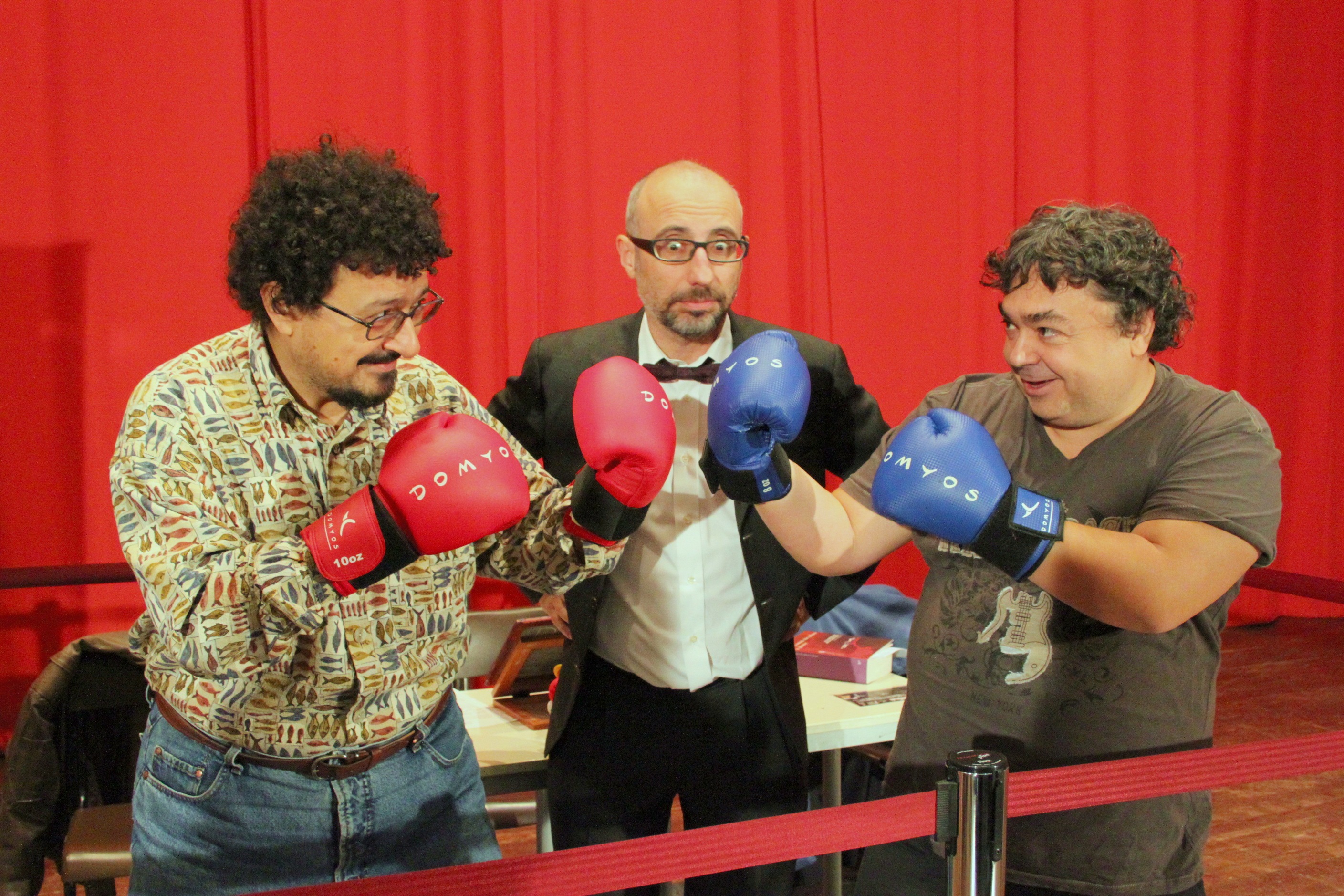 gli sfidanti